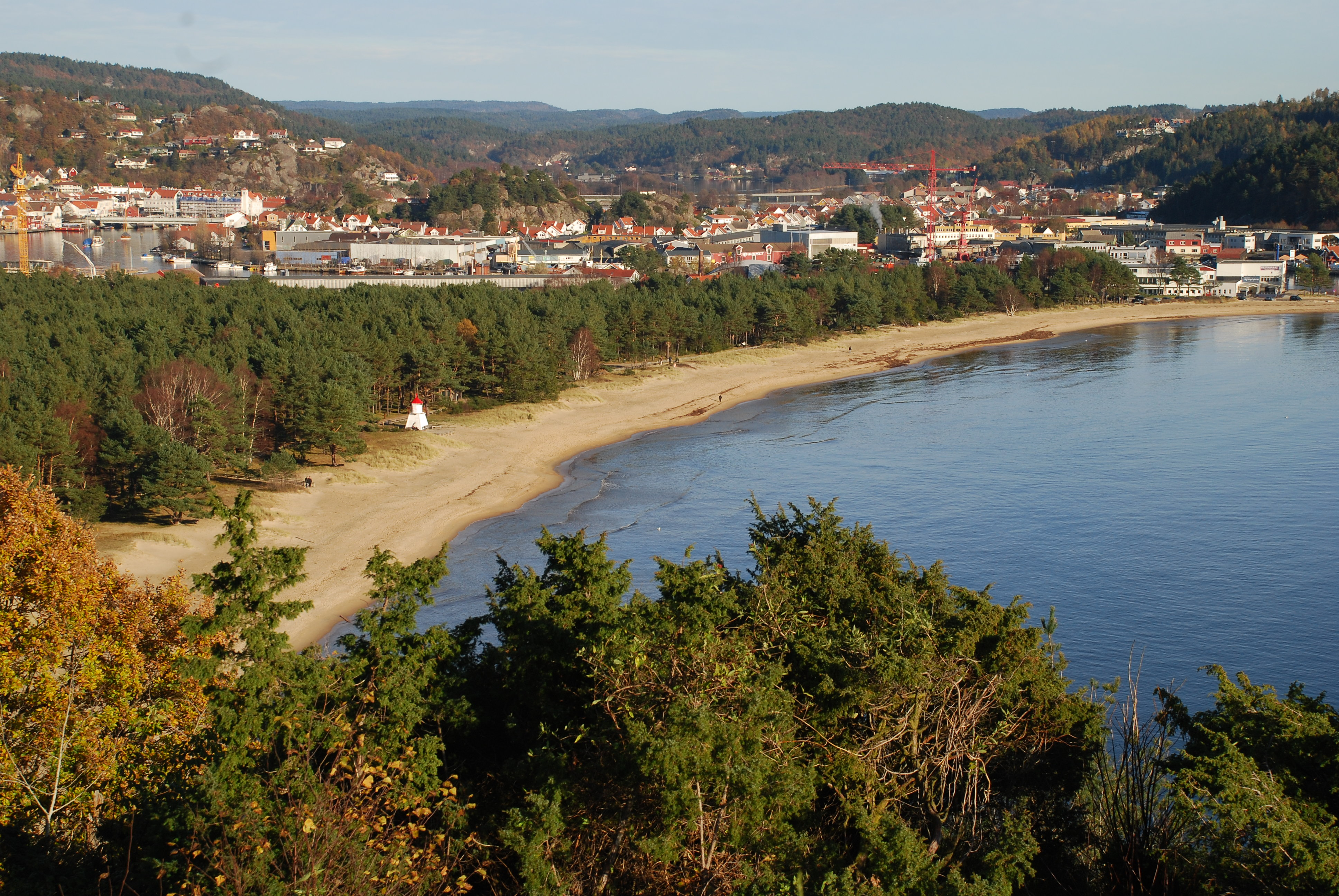 Sjøsanden fra Hobdetoppen